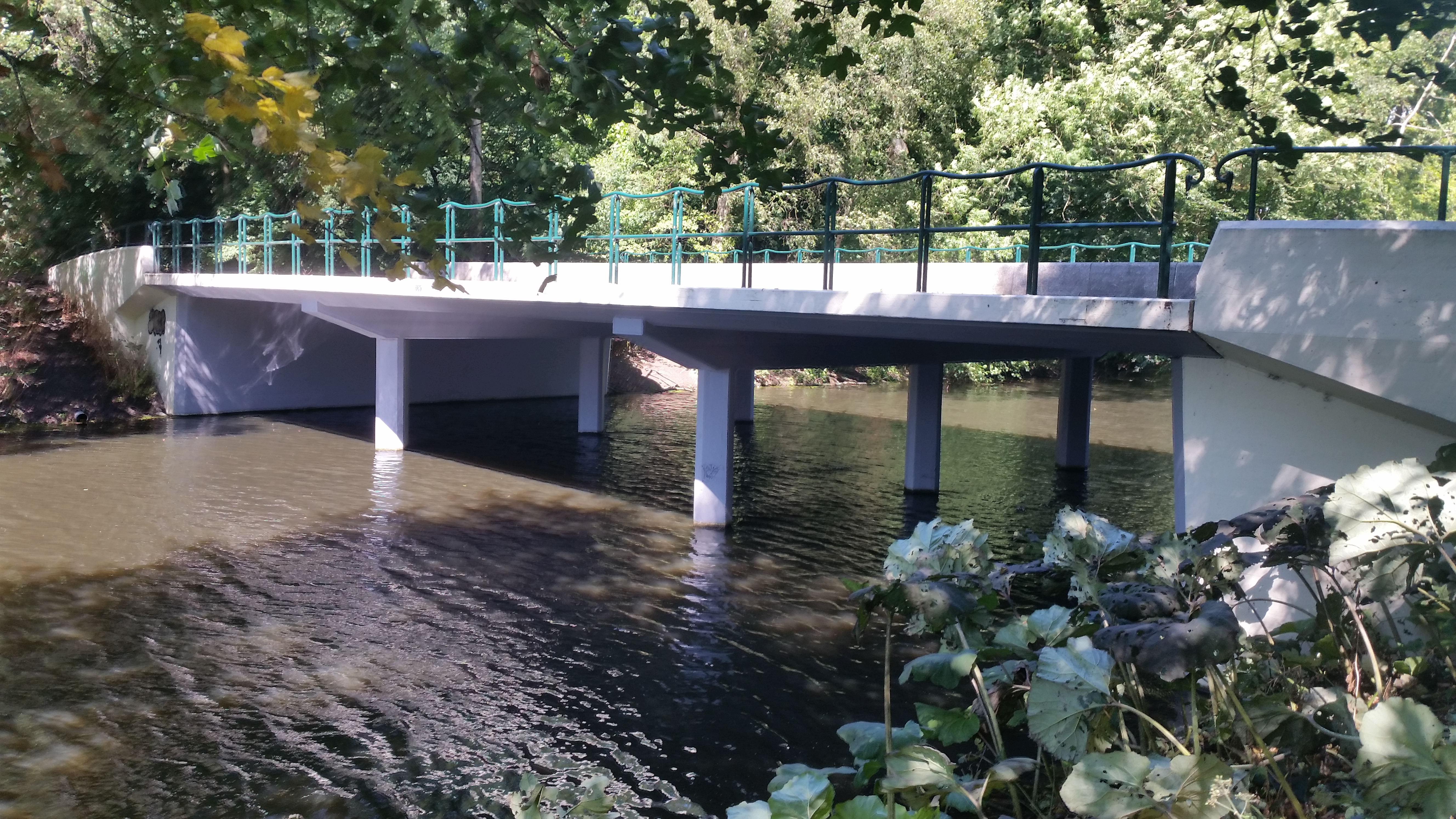 Brug 569 (in Amsterdam), slanke overspanning tussen massieve landhoofden